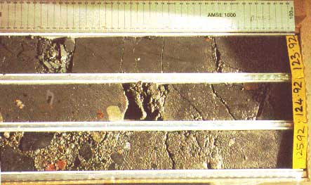 Cape-Roberts-Bohrprojekt Bild von Bohrkern-Querschnitt von der Projektwebsite